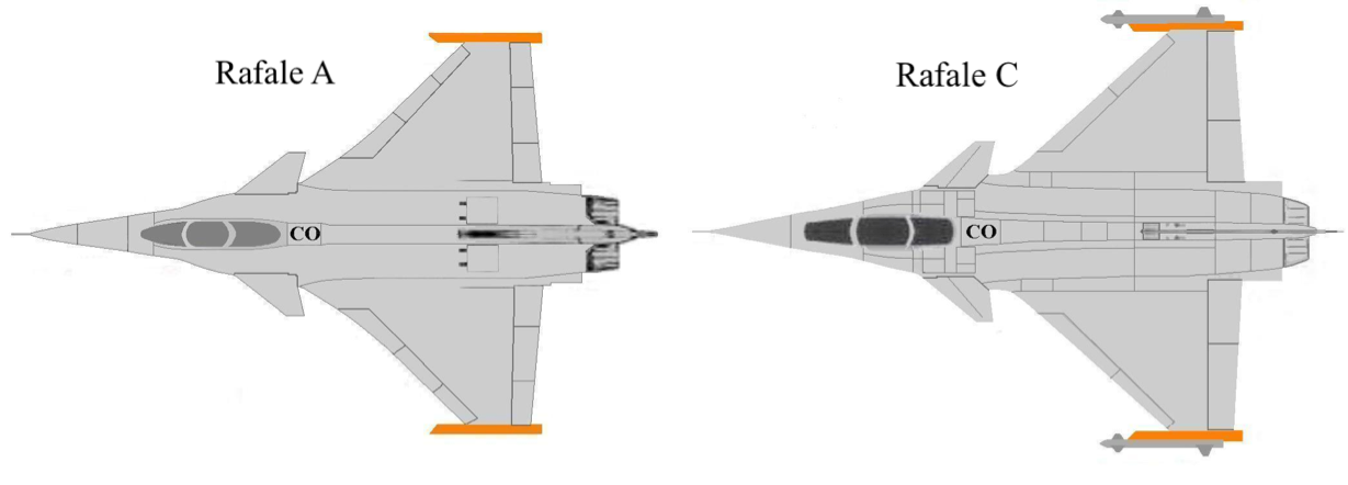 Vergleich der Rafale A und der Rafale C Unknown